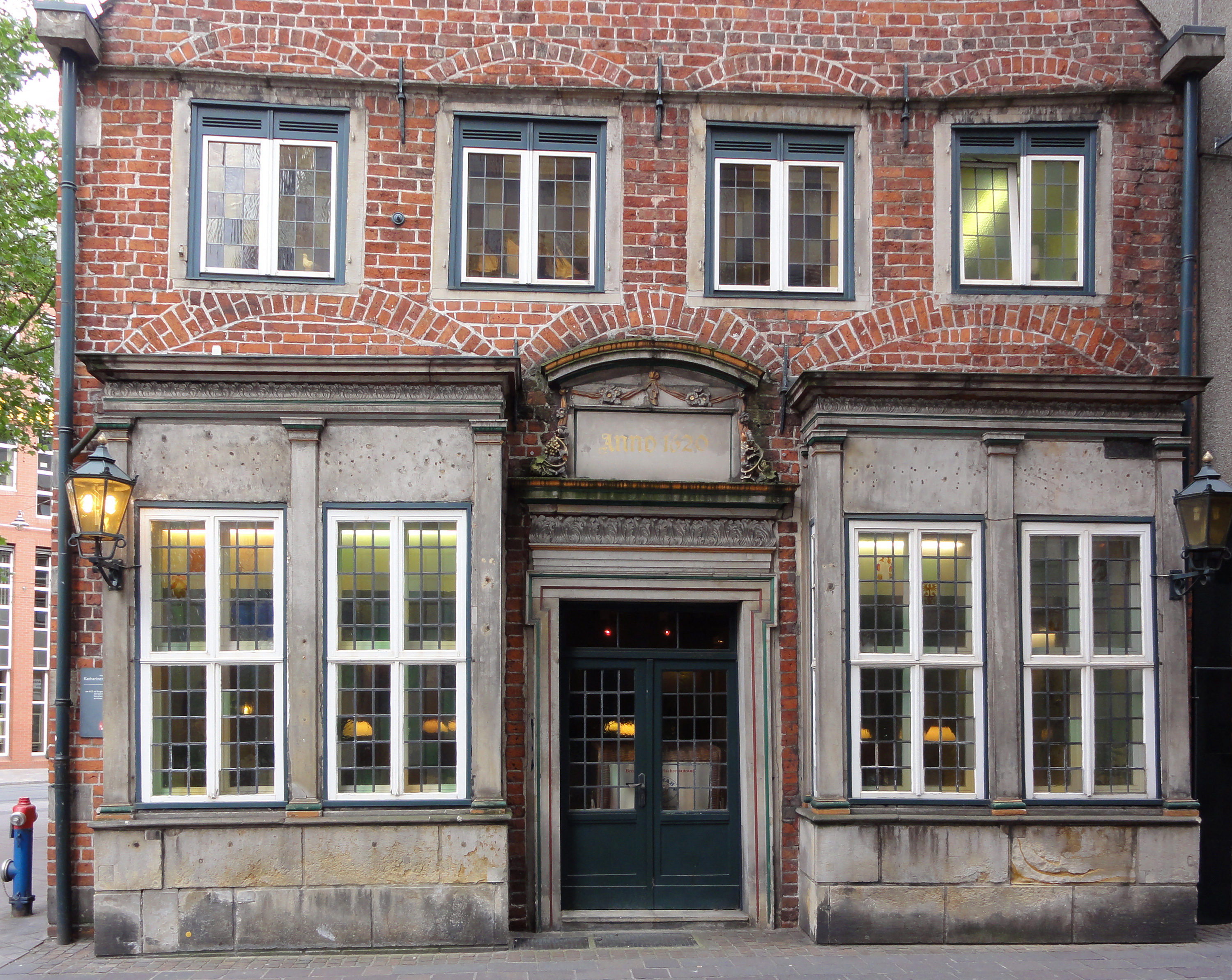 Fischrestaurant Knurrhahn, Restauration und Bierhalle H. Beckröge in Bremen, Katharinenstraße 15Das abgebildete Objekt ist ein geschütztes Kulturdenkmal in der Freien Hansestadt Bremen, mit der Nr. 0643 beim Landesamt für Denkmalpflege registriert.